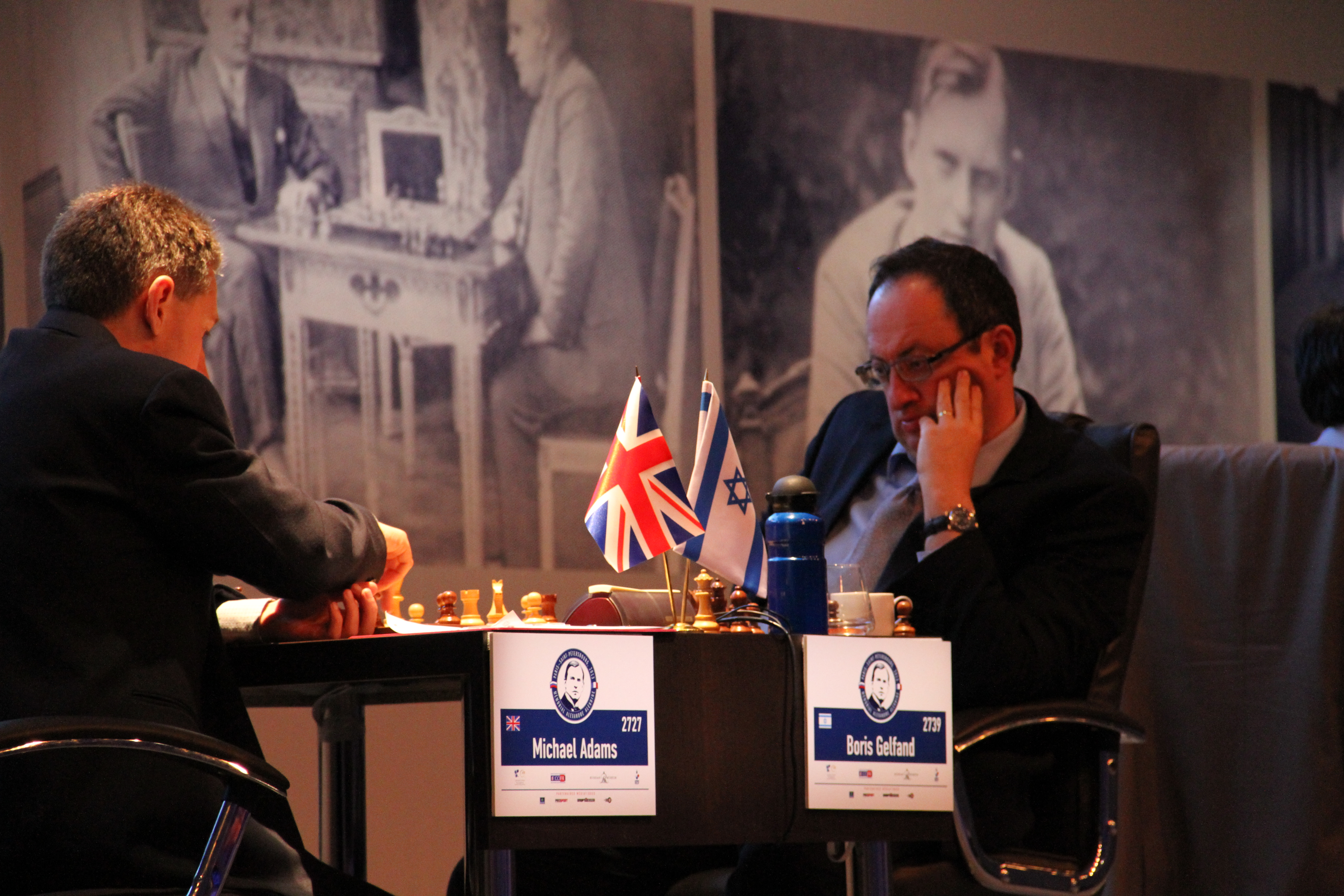 Boris Guelfand face à Michael Adams au Mémorial Alekhine 2013 (Paris)